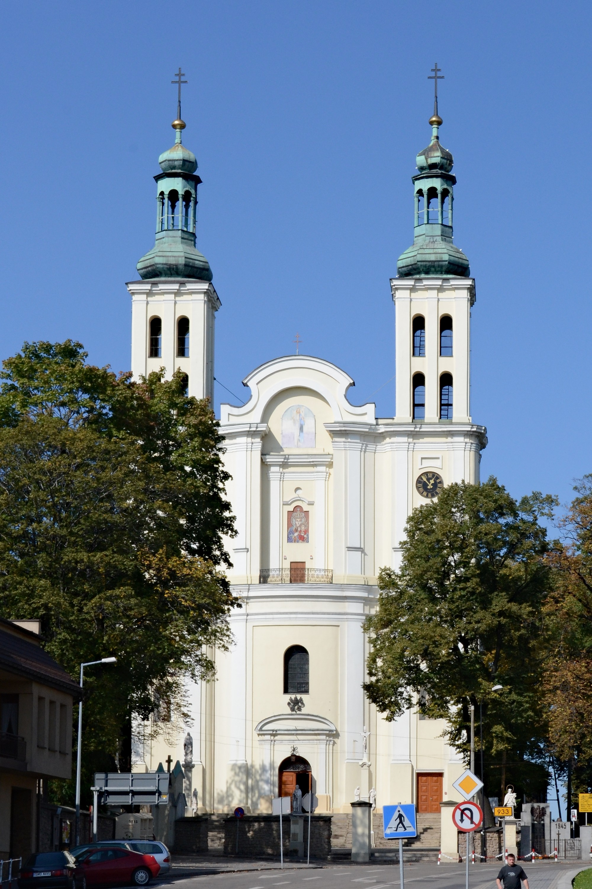 Fasada bazyliki. Pszów, ul. Bohaterów Westerplatte 1, Wodzisław Śląski 08.1966.